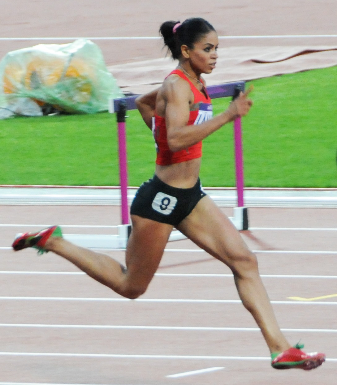 Hayat Lambarki sur 400m haies aux jeux olympique de Londres 2012.